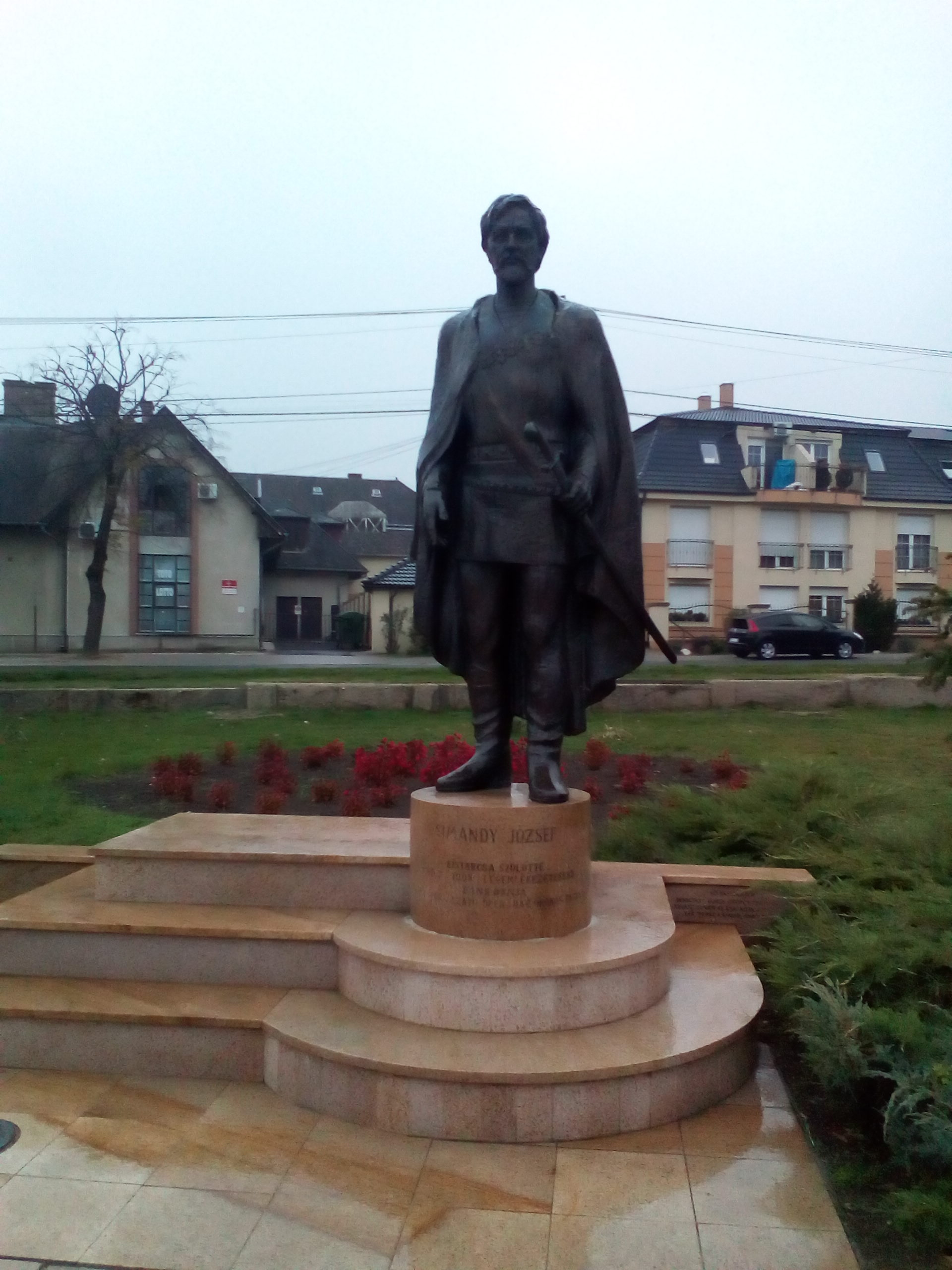 Simándy József szobra (2006, Janzer Frigyes). - Pest megye, Kistarcsa, a Simándy téren, a Csigaház előtt áll.